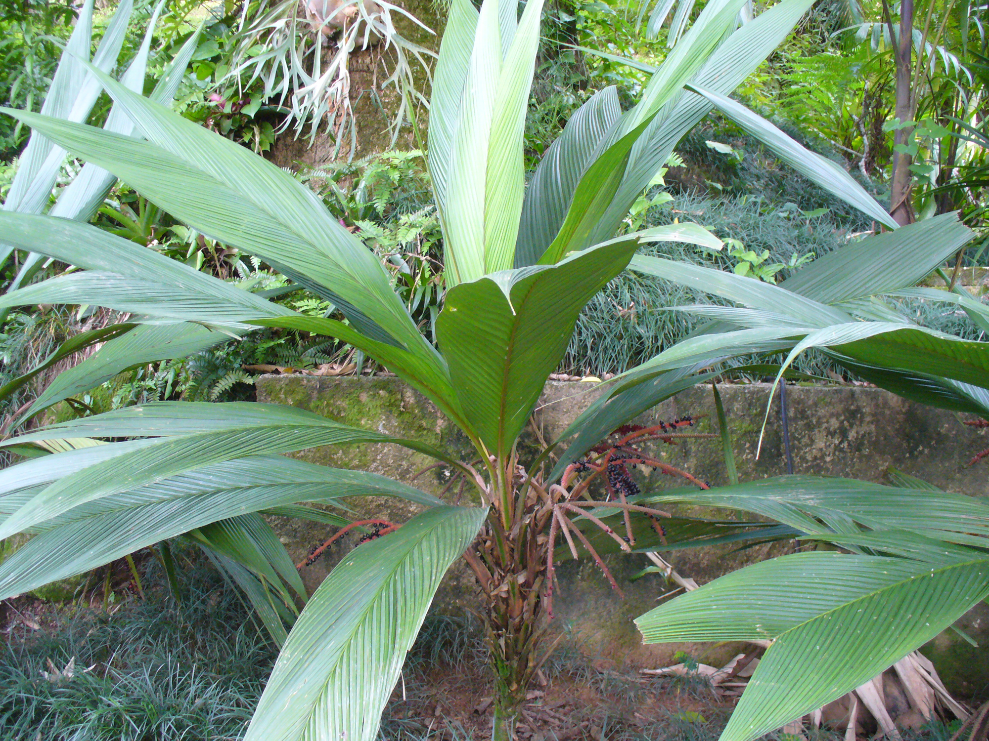 Asterogyne martiana, cultivated, Boa Esperanza ranch, Brazil.